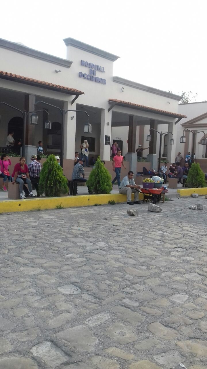 Hospital de Occidente de Santa Rosa de Copán